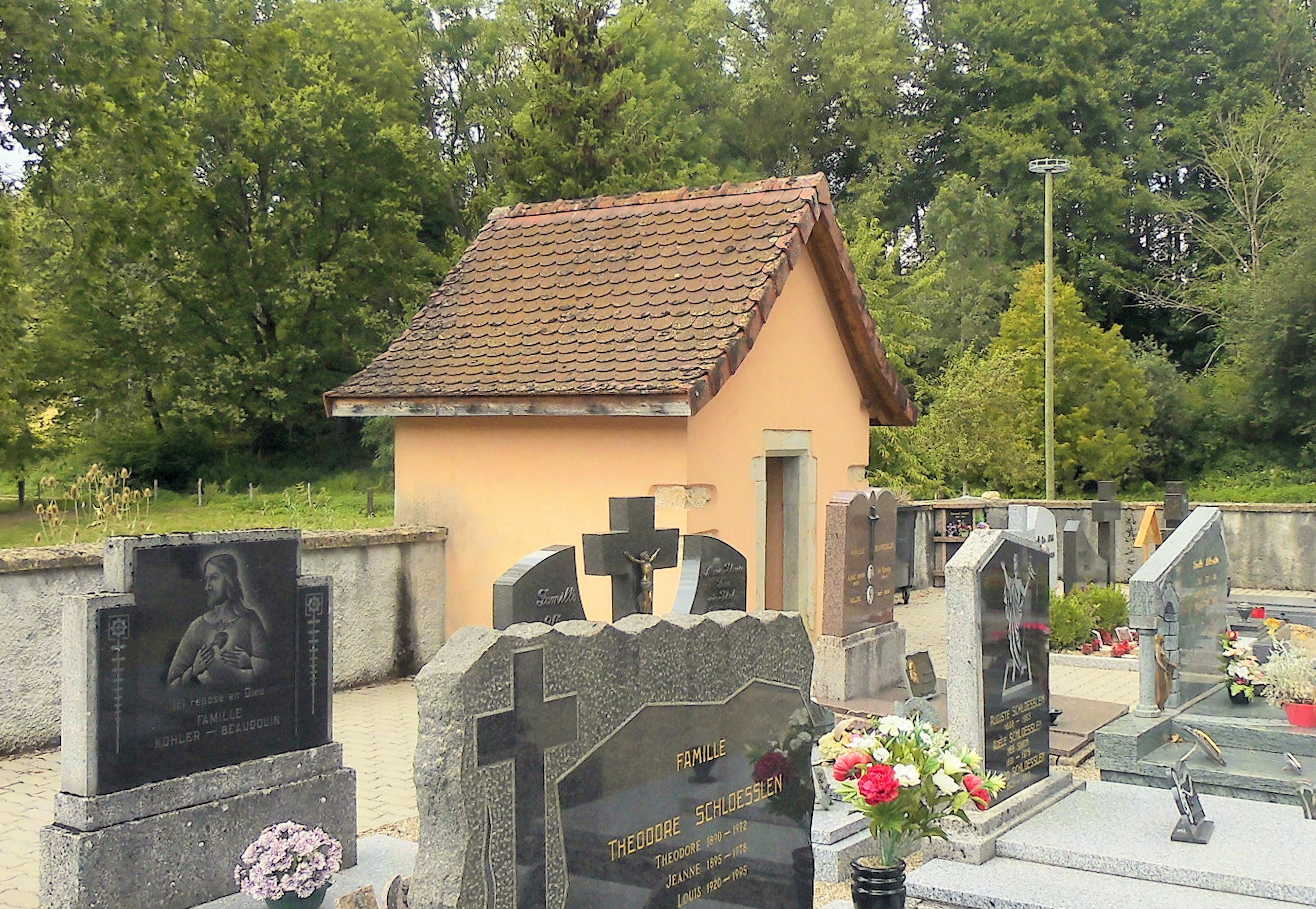 La chapelle ducimetière, ancien chœur de l'église Saint-Georges à Largitzen